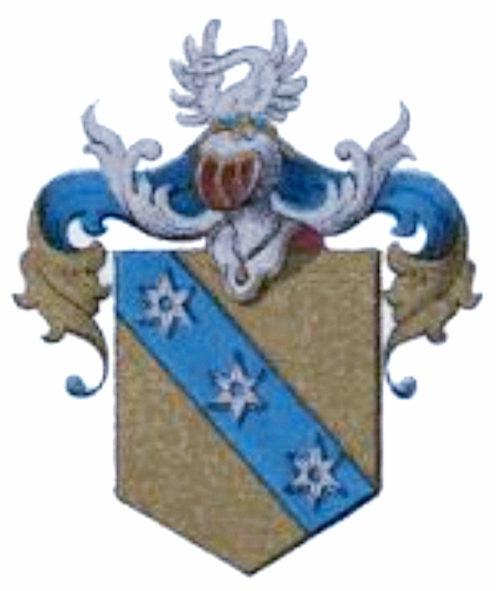 Wappen derer de Senarclens (von Neuchâtel)